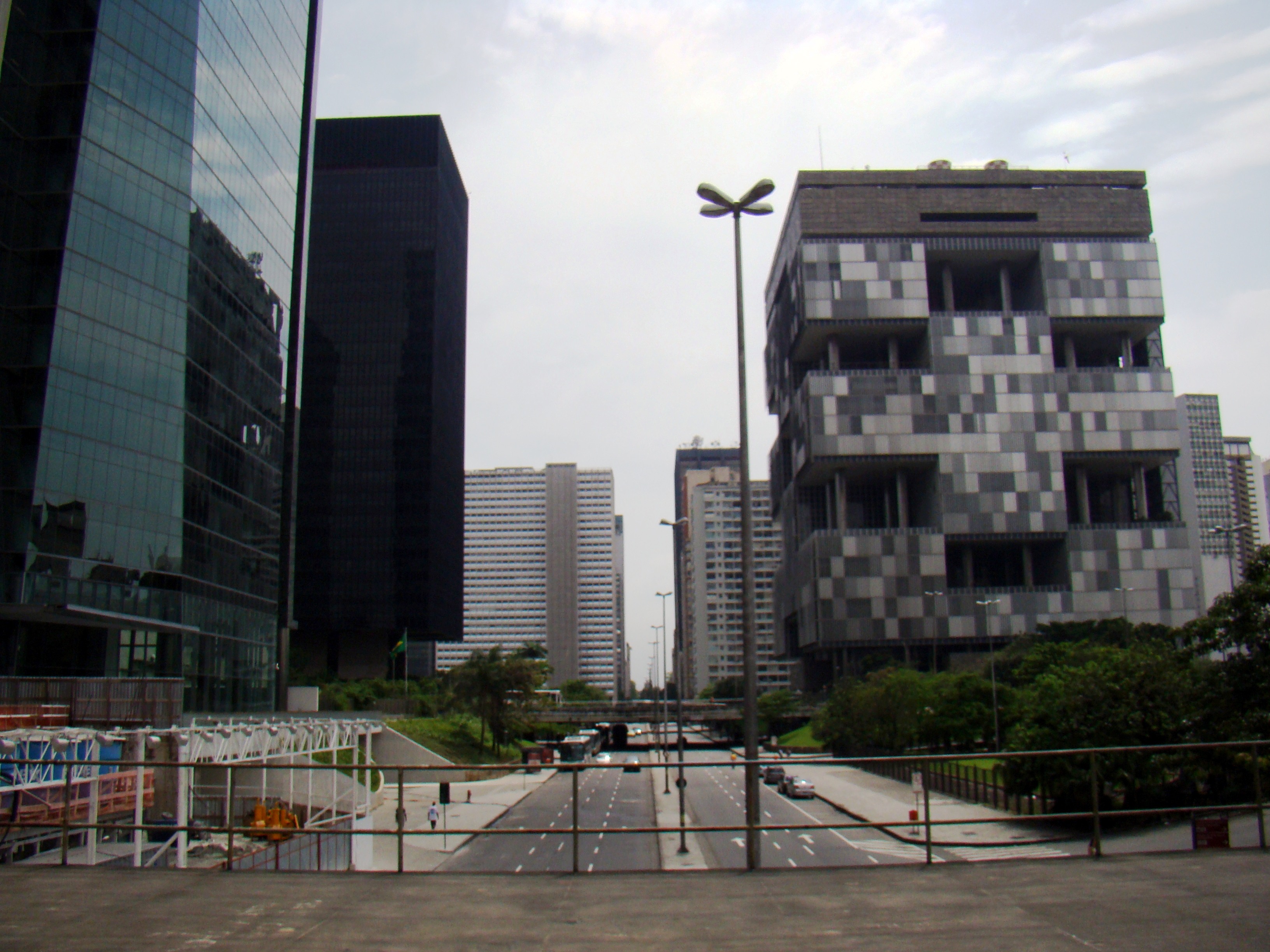 A Avenida República do Chile ou Avenida Chile, é uma via da cidade do Rio de Janeiro, localizada no bairro do Centro e tem início na Rua do Lavradio e término no Largo da Carioca. Foi aberta em 1960 em terrenos do demolido Morro de Santo Antônio, possibilitando uma variante do trânsito proveniente da Zona Norte que utilizava a já congestionada Rua do Riachuelo. Como uma avenida moderna, apresenta as mais arrojadas construções do Centro, como o edifício da Petrobrás, do Banco Nacional de Desenvolvimento Econômico e Social – BNDES, o Conjunto Cultural da Caixa Econômica Federal e a Catedral Metropolitana, todos significativos exemplares da arquitetura brasileira. São edifícios de uso comercial e alguns deles pertencem as mais poderosas estatais brasileiras.